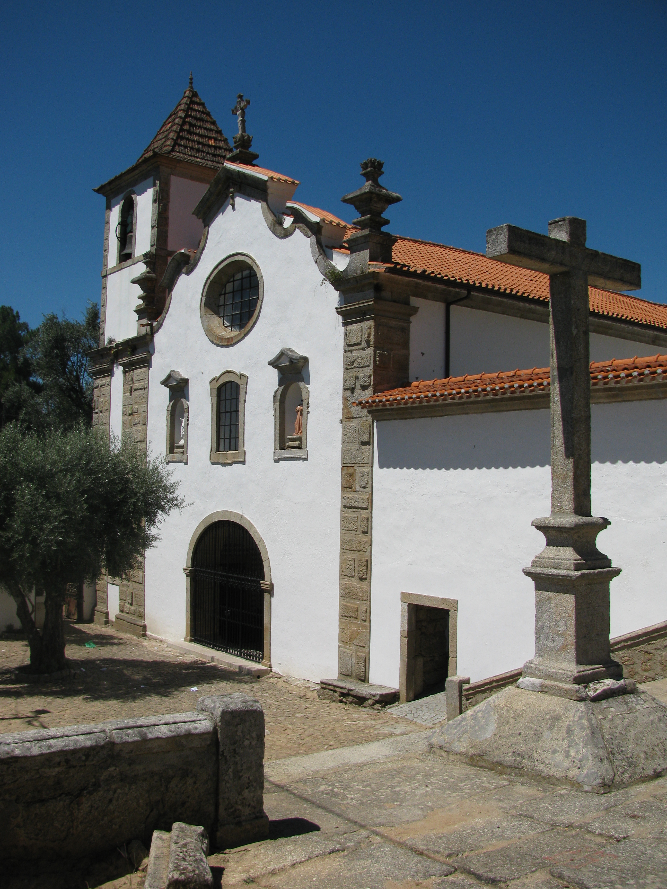 Convento de S. Francisco do Monte - 02